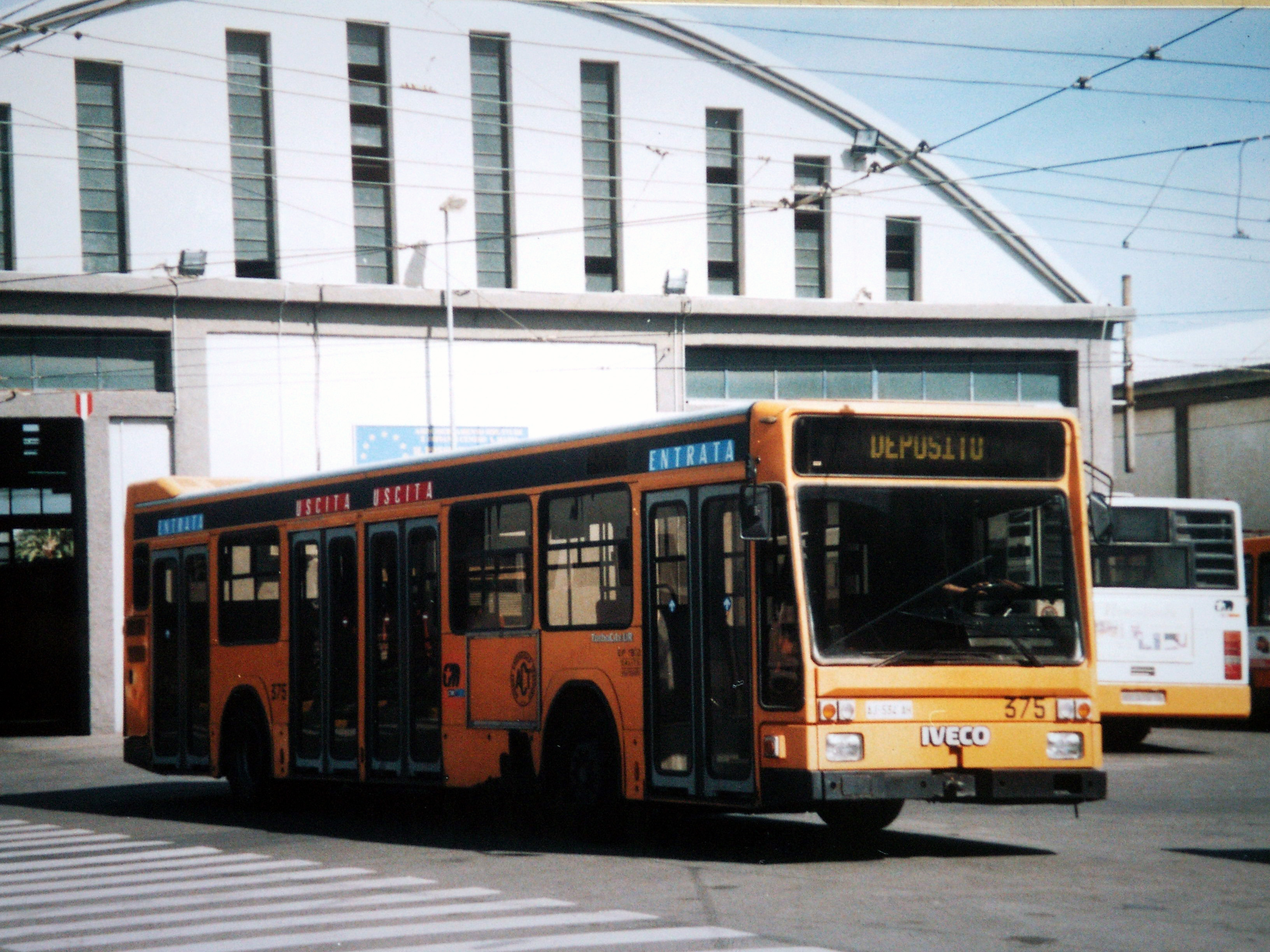 Iveco 490 (Iveco Turbocity R) ante, matricola n. 375. Deposito della CTM, Cagliari, Sardegna